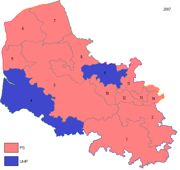 Carte présentant le Pas-de-Calais et ses circonscriptions en 2007.